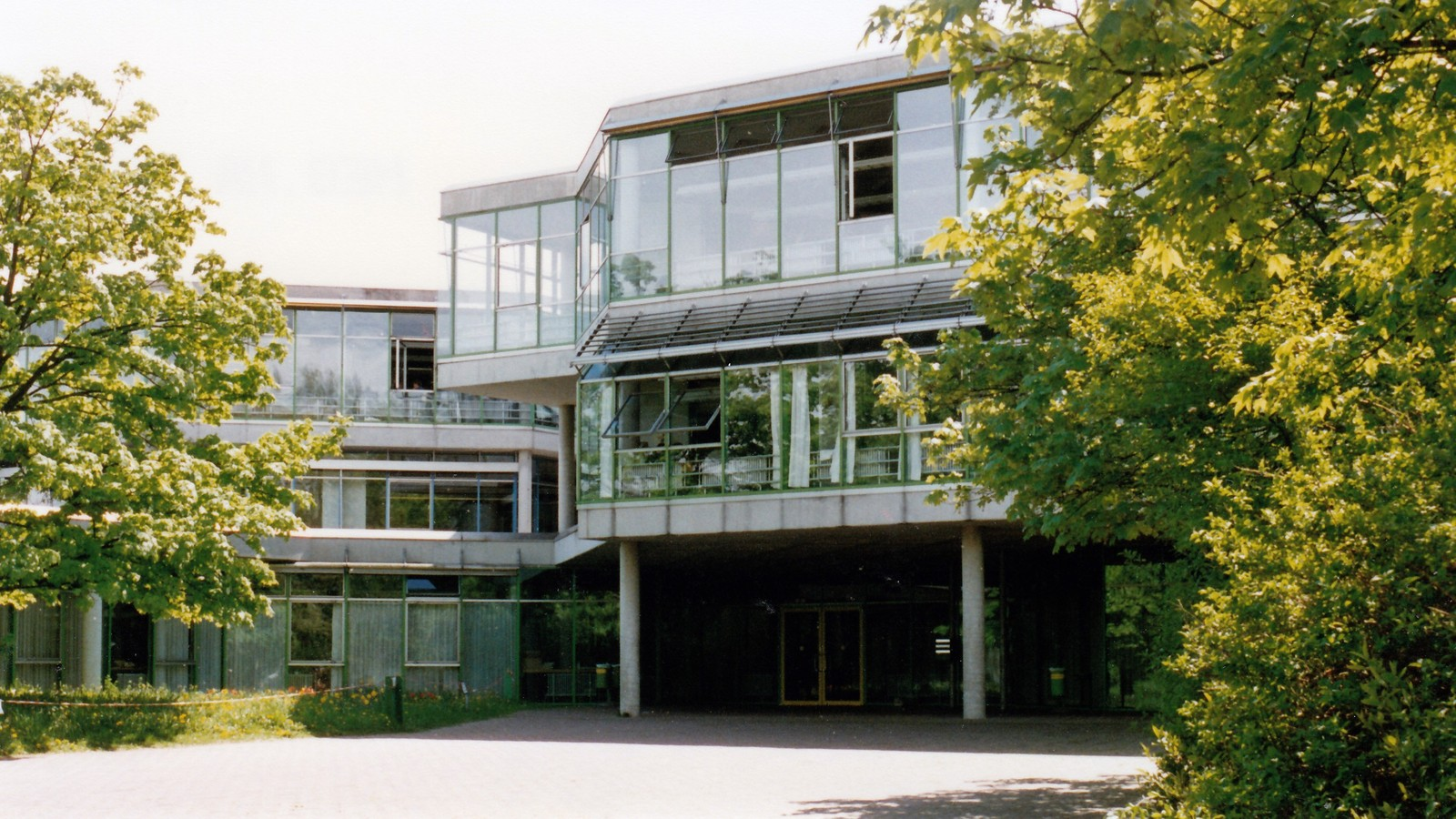 Josef-Effner-Gymnasium Dachau